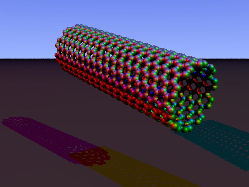 see name